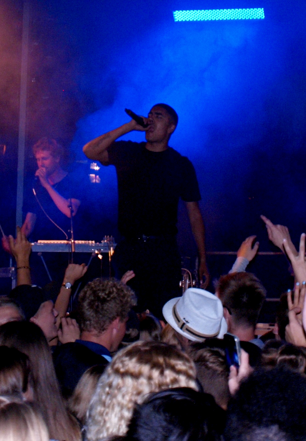 Kesi, dansk rap musiker, Kolding kulturnat 21. august 2015